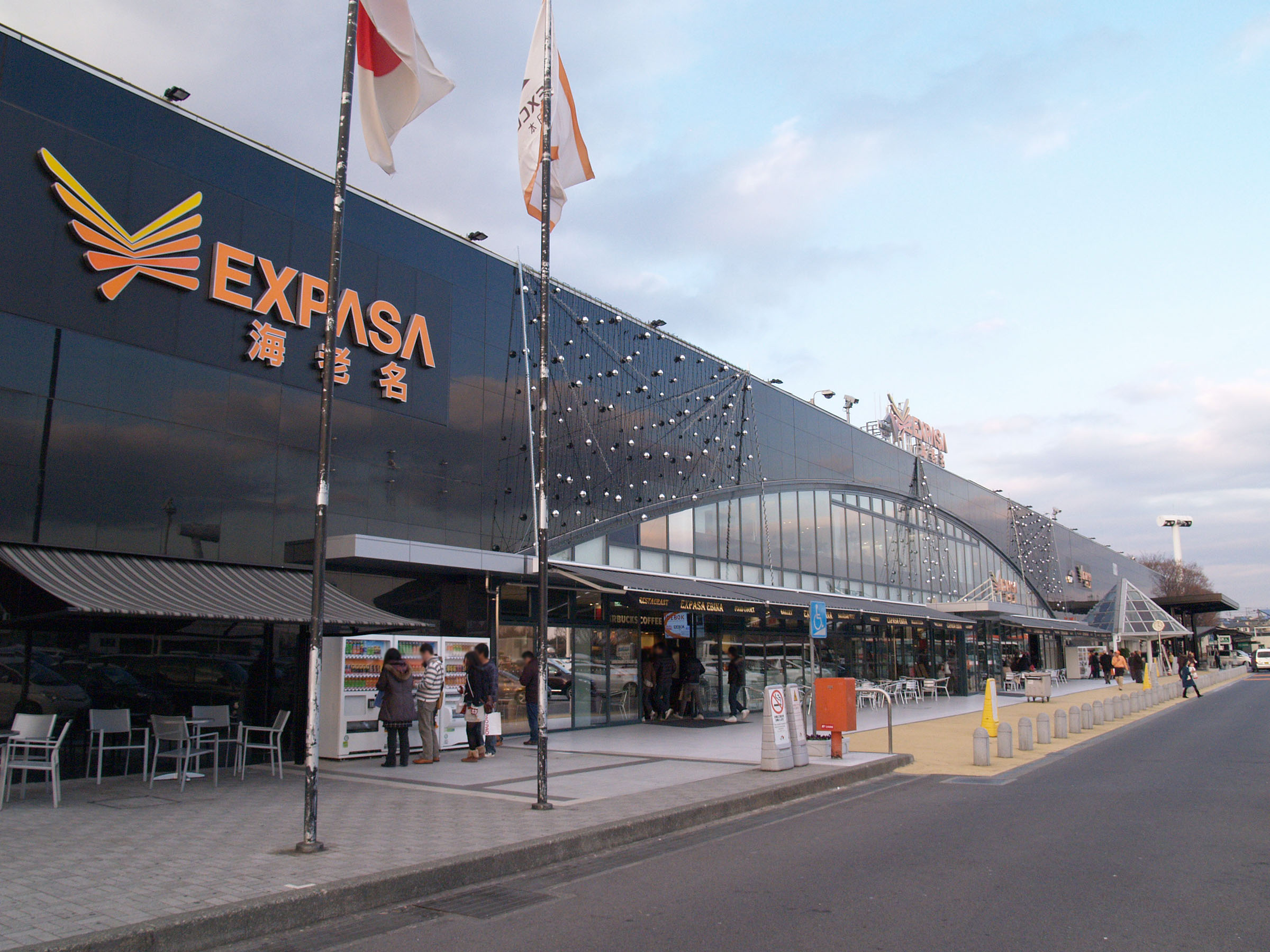 海老名サービスエリア上り線施設